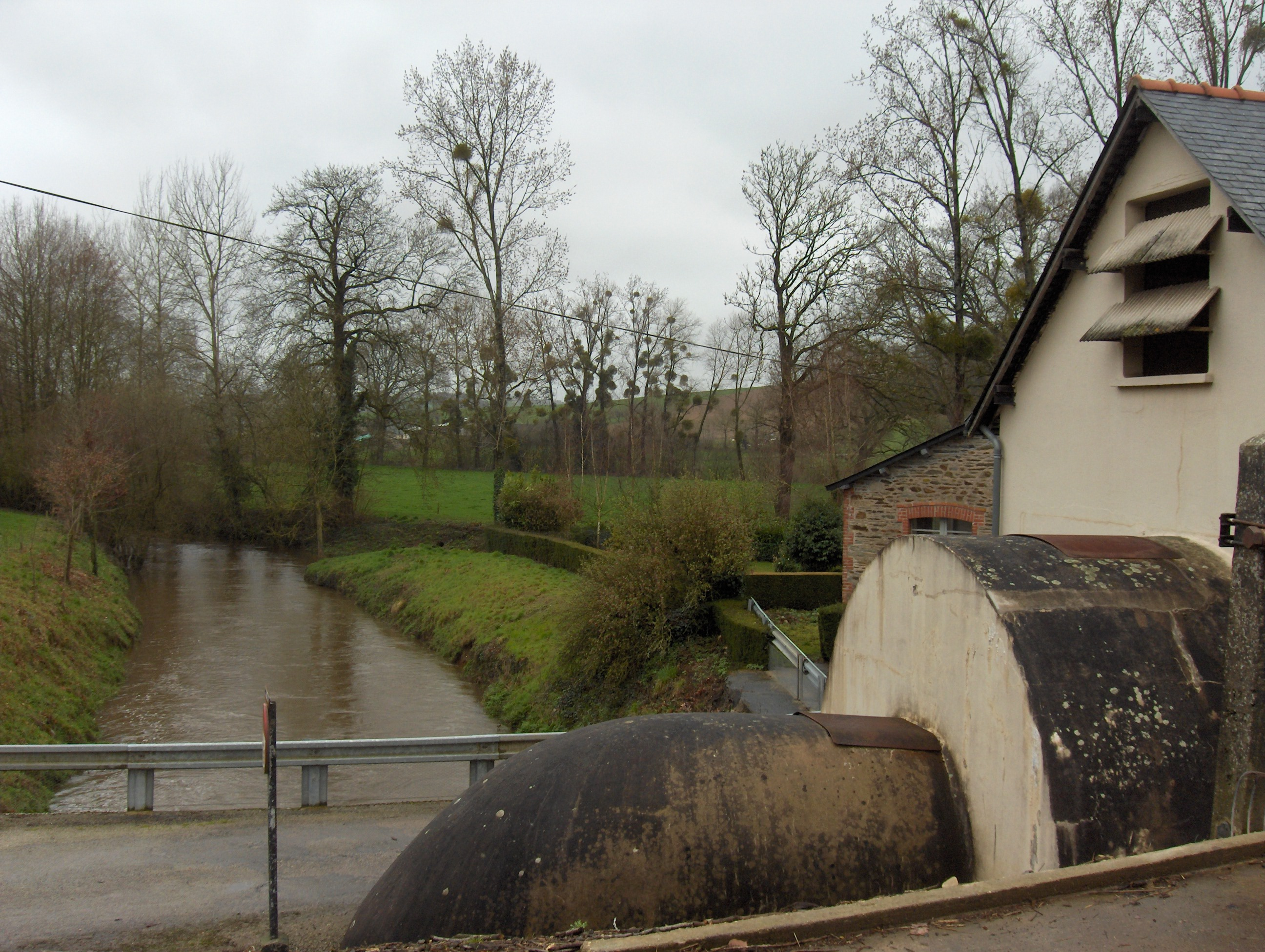 Les Forges